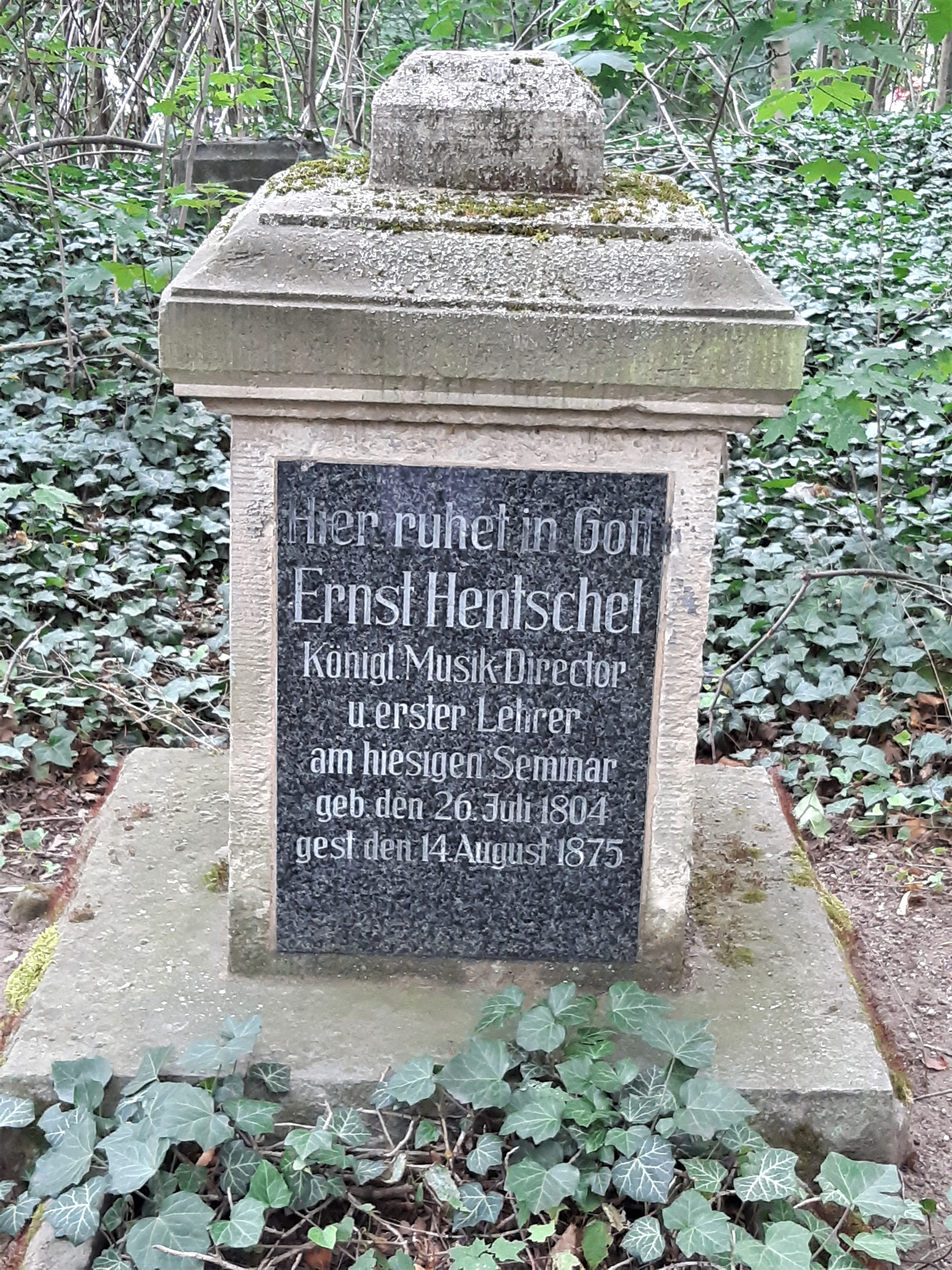 Grab von Ernst Hentschel, Musikdirektor und Lehrer am Lehrerseminar Weißenfels, Alter Friedhof Weißenfels, heute Stadtpark